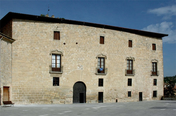 Santa Coloma de Queralt (Conca de Barberà). Façana del palau o castell de Santa Coloma.